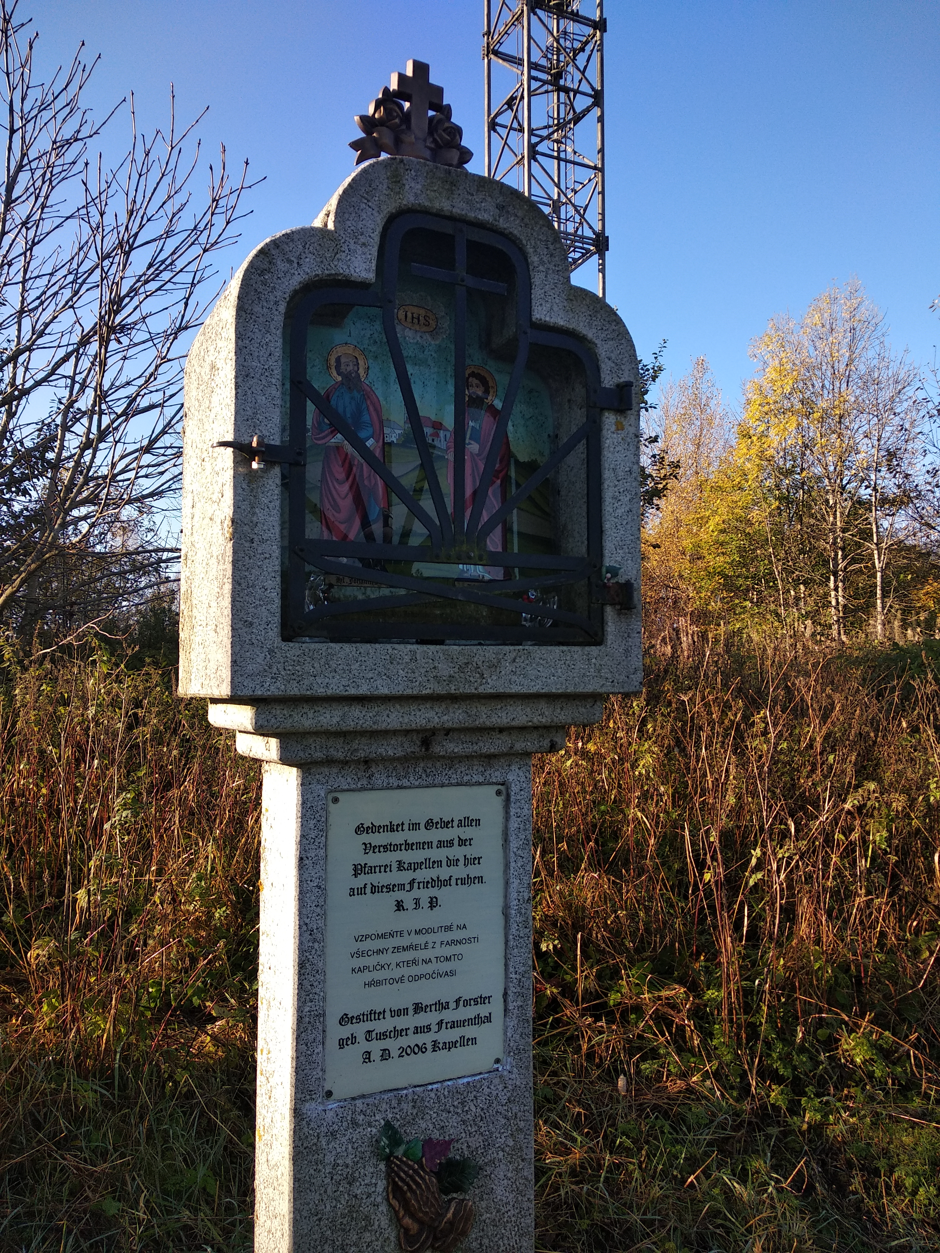 Boží muka a strážní věž v Kapličkách, okres Český Krumlov, Jihočeský kraj